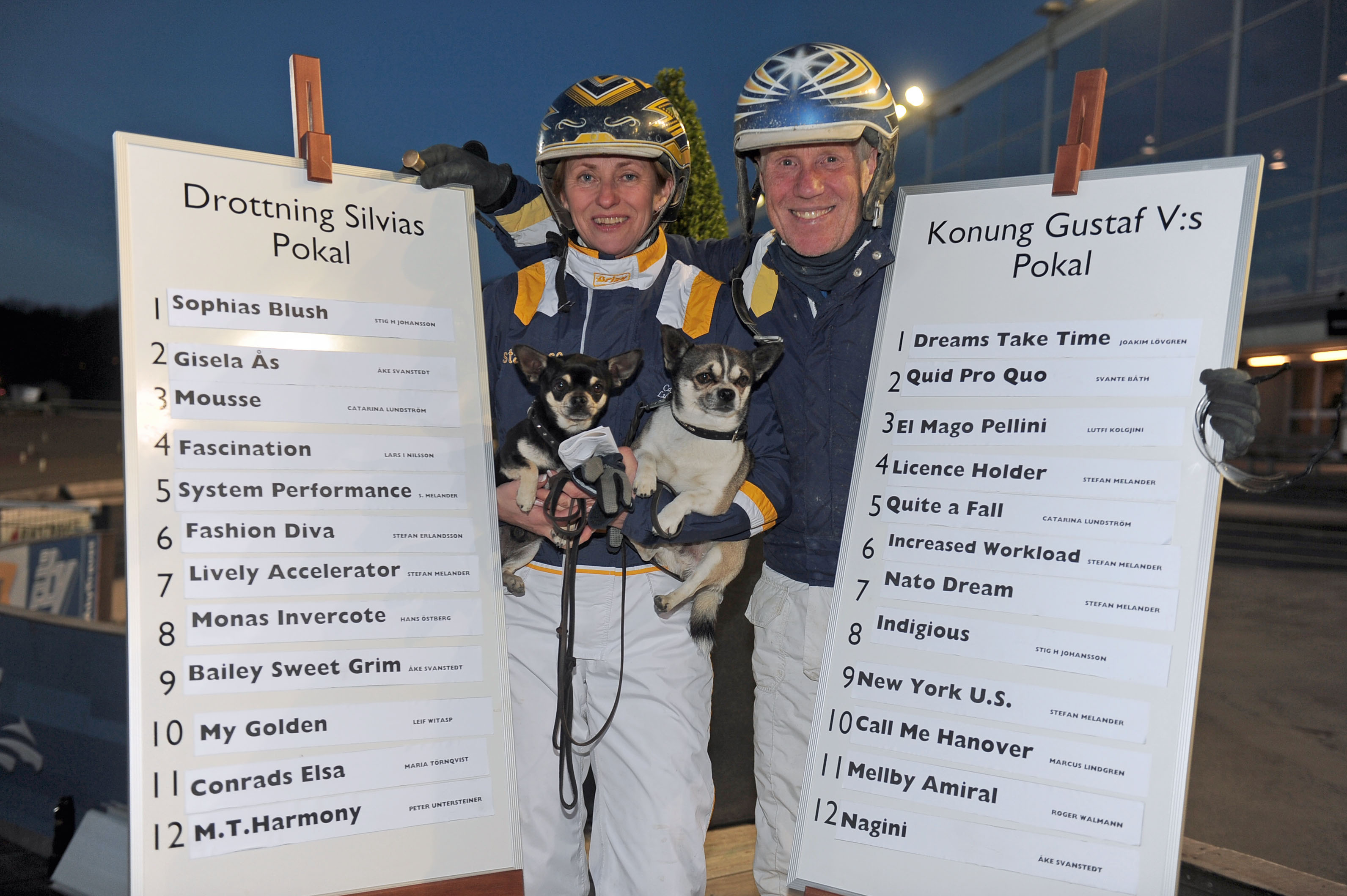 foto : ck : åby 130502 foto claes kärrstrand Catarina Lundström och Stefan Melander lade beslag 8 st finalplatser till Kungapokalen och Drottning Silvias Pokal 2013.